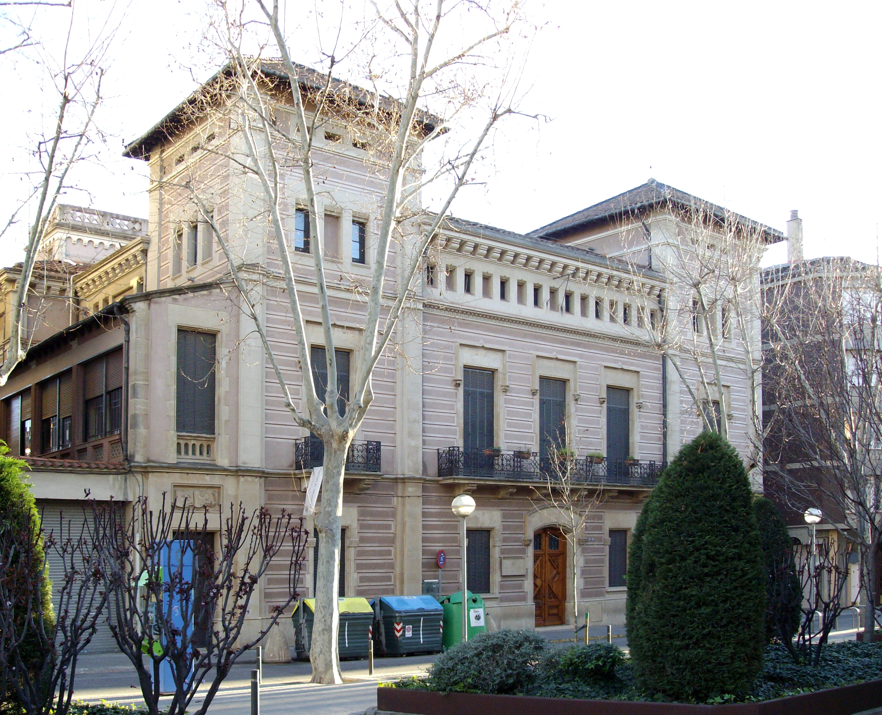 Archivo Histórico de Sabadell, ubicado en la casa Ponsà, construida en 1891 por Gabriel Borrell i Cardona como residencia del industrial Francesc de Paula Ponsà, situada en la calle Indústria, 32-34, de Sabadell, Barcelona (España).